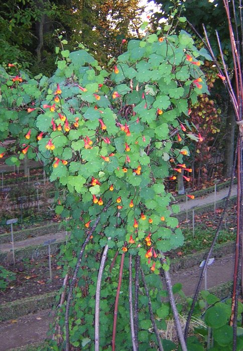 Tropaeolum tuberosum, capucine tubereuse (Jardin du Thabor à Rennes en France)